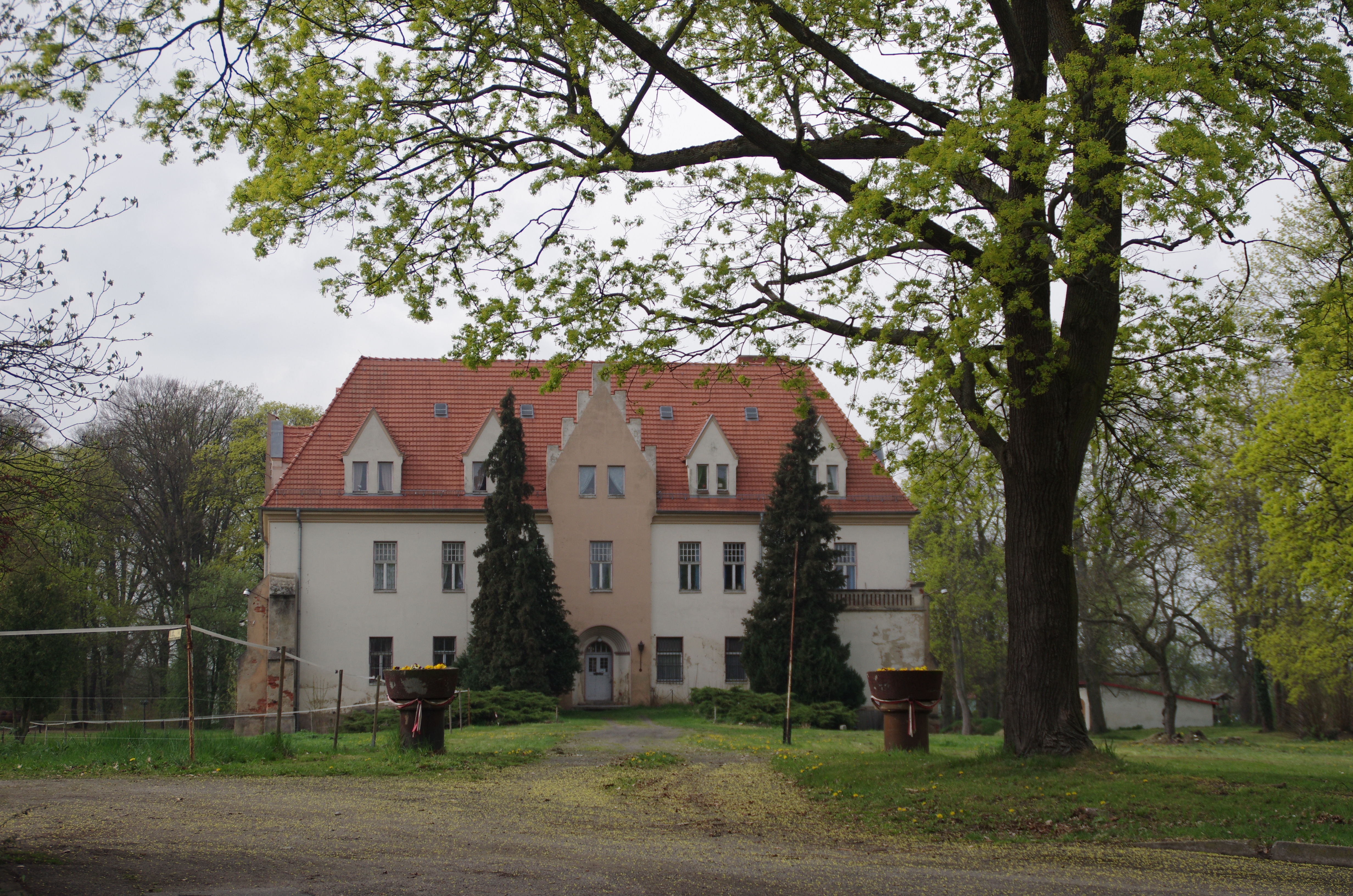 Lebusa in Brandenburg. Das Gebäude auf dem Bild steht unter Denkmalschutz.